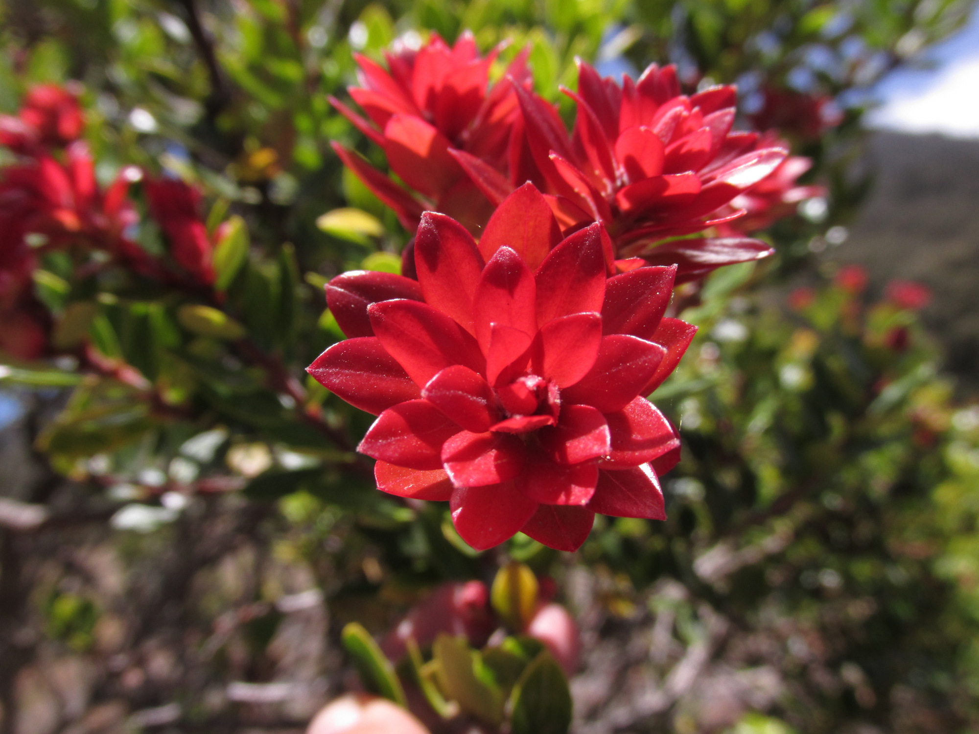 Daun yang masih muda berwarna merah (Vaccinium varingifolium)